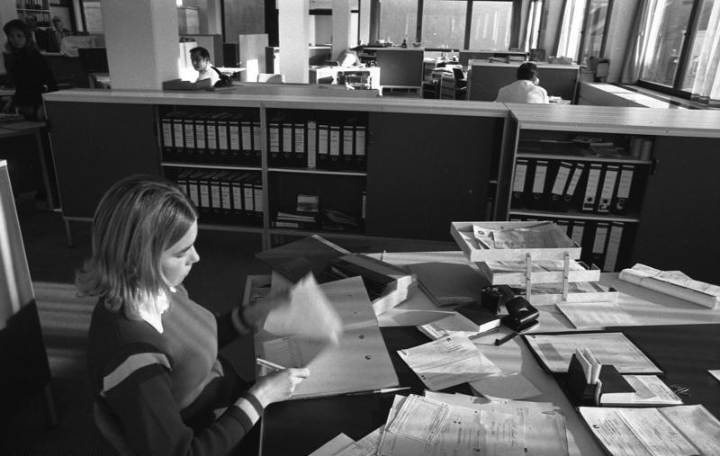 Kaiser-Leuchten-Fabrik Neheim-Hüsten